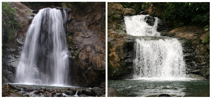 cascada el arco iris y cascada el tobogan ubicadas en la parroquia Salati , Cantón Portovelo